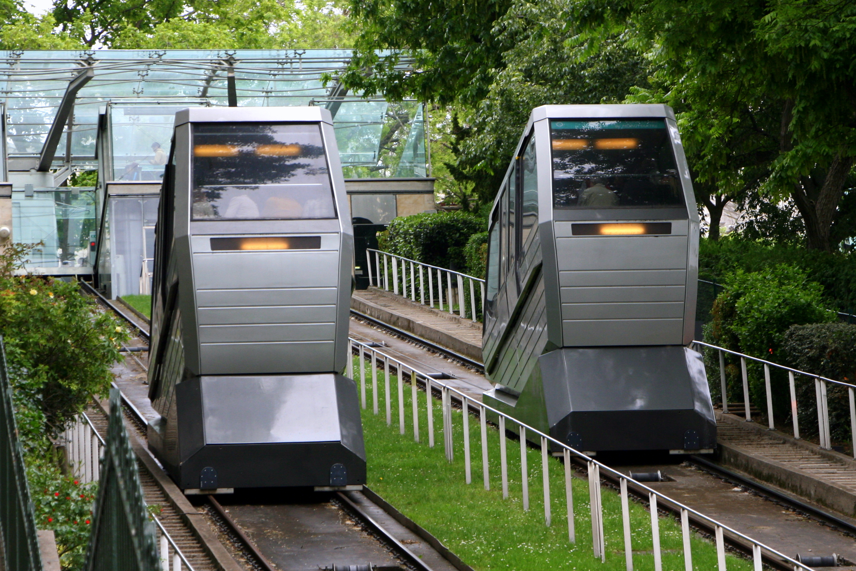 Gebouwd 1900, gerenoveerd in 1935 en 1991.